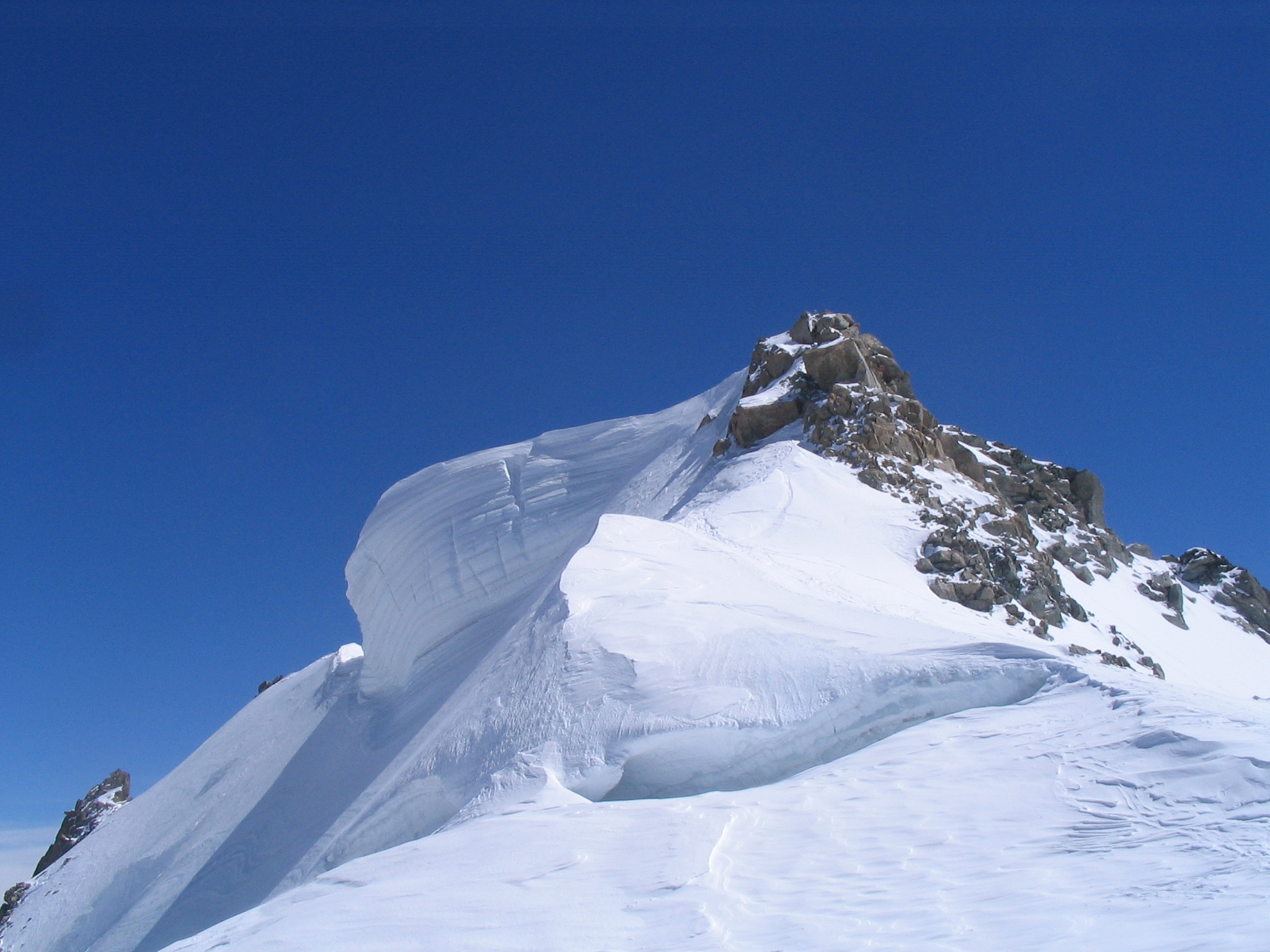 Sommet du mont blanc du tacul, 30 avril 2006 Licensing Catégorie:Sommet des Alpes françaises Catégorie:Massif du Mont-Blanc Catégorie:montagne